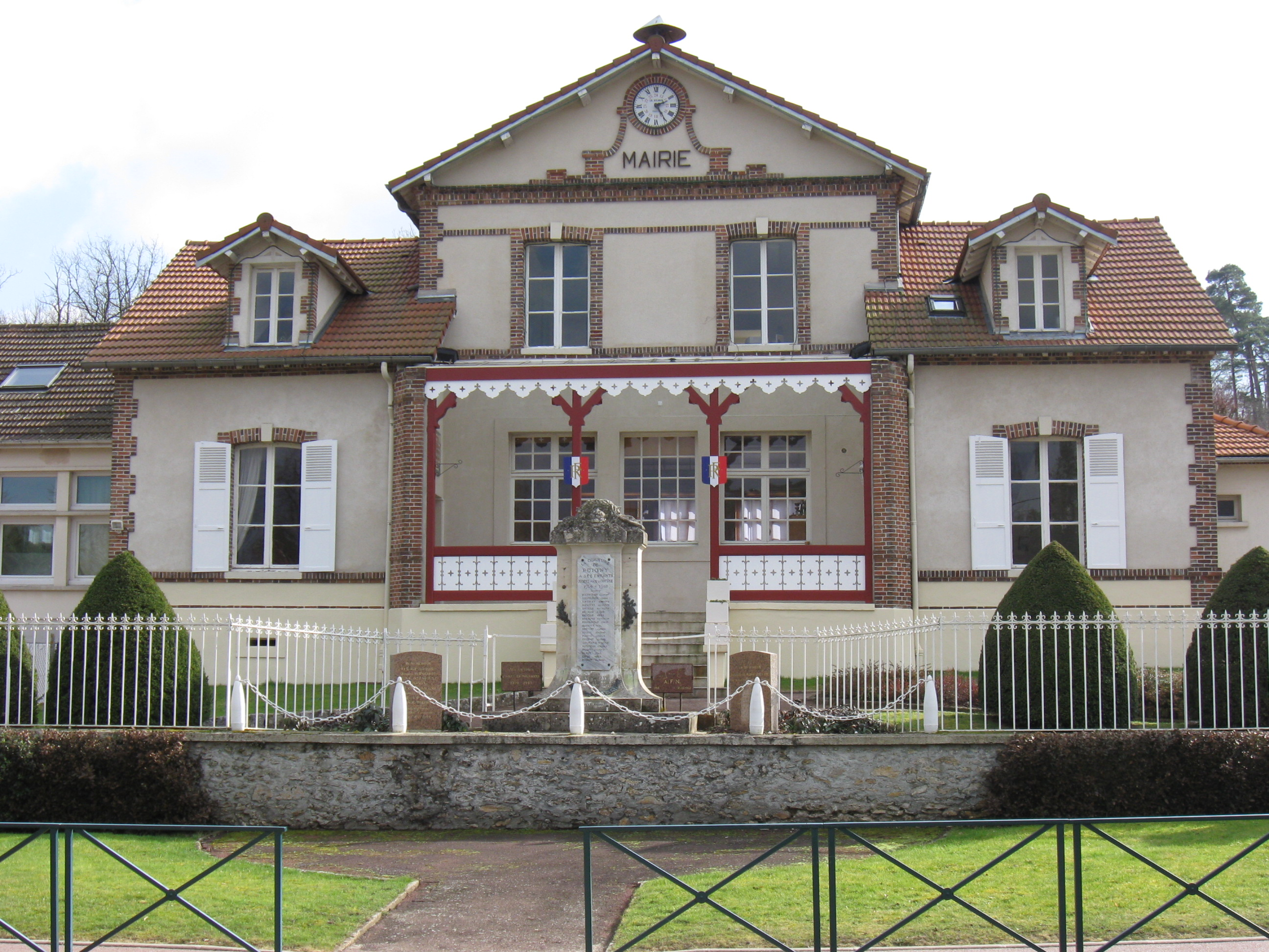 La mairie-école de Poigny-la-Forêt (département des Yvelines, région Île-de-France)